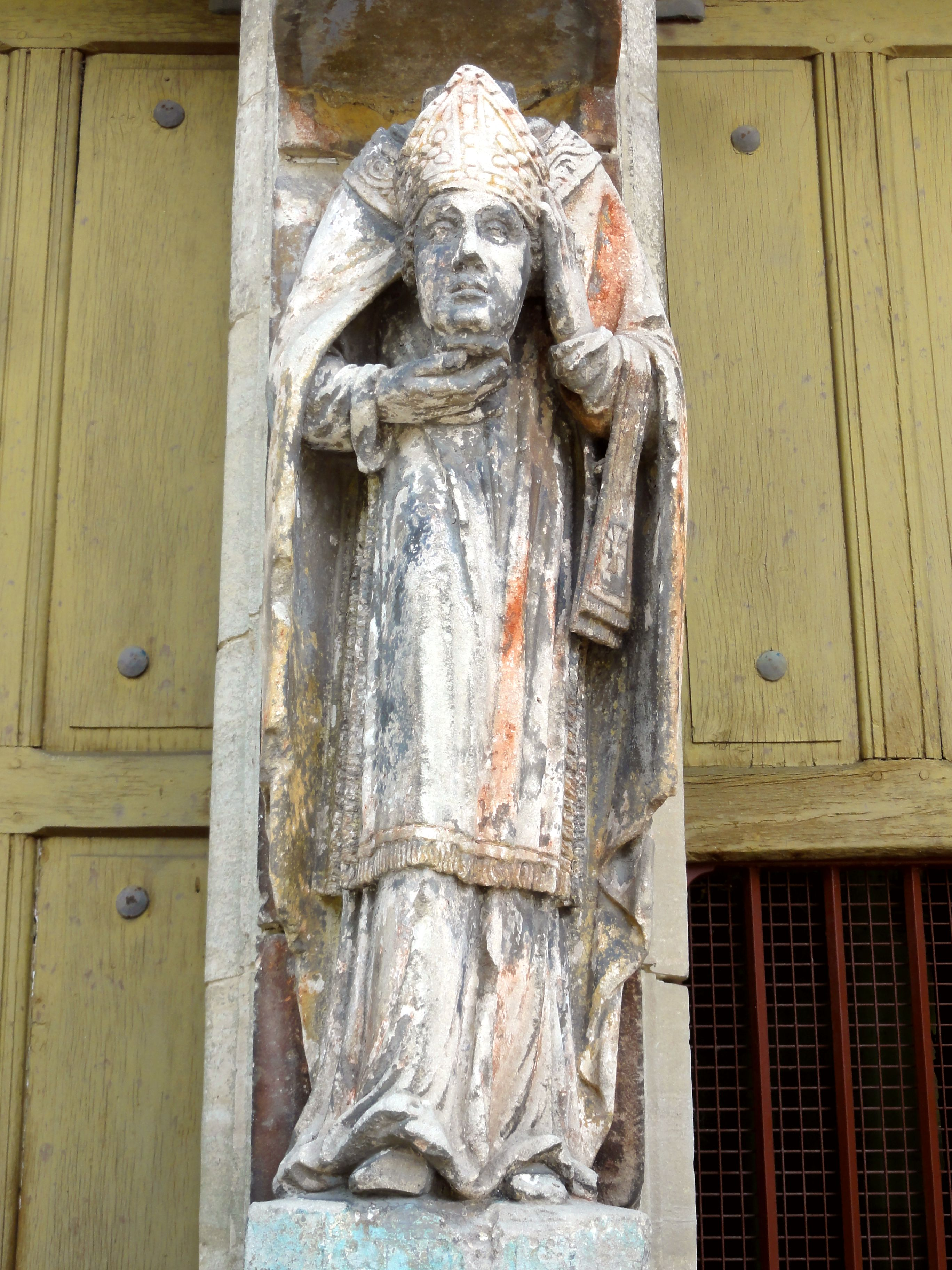 Trumeau du portail avec la statue de saint Denis céphalophore.